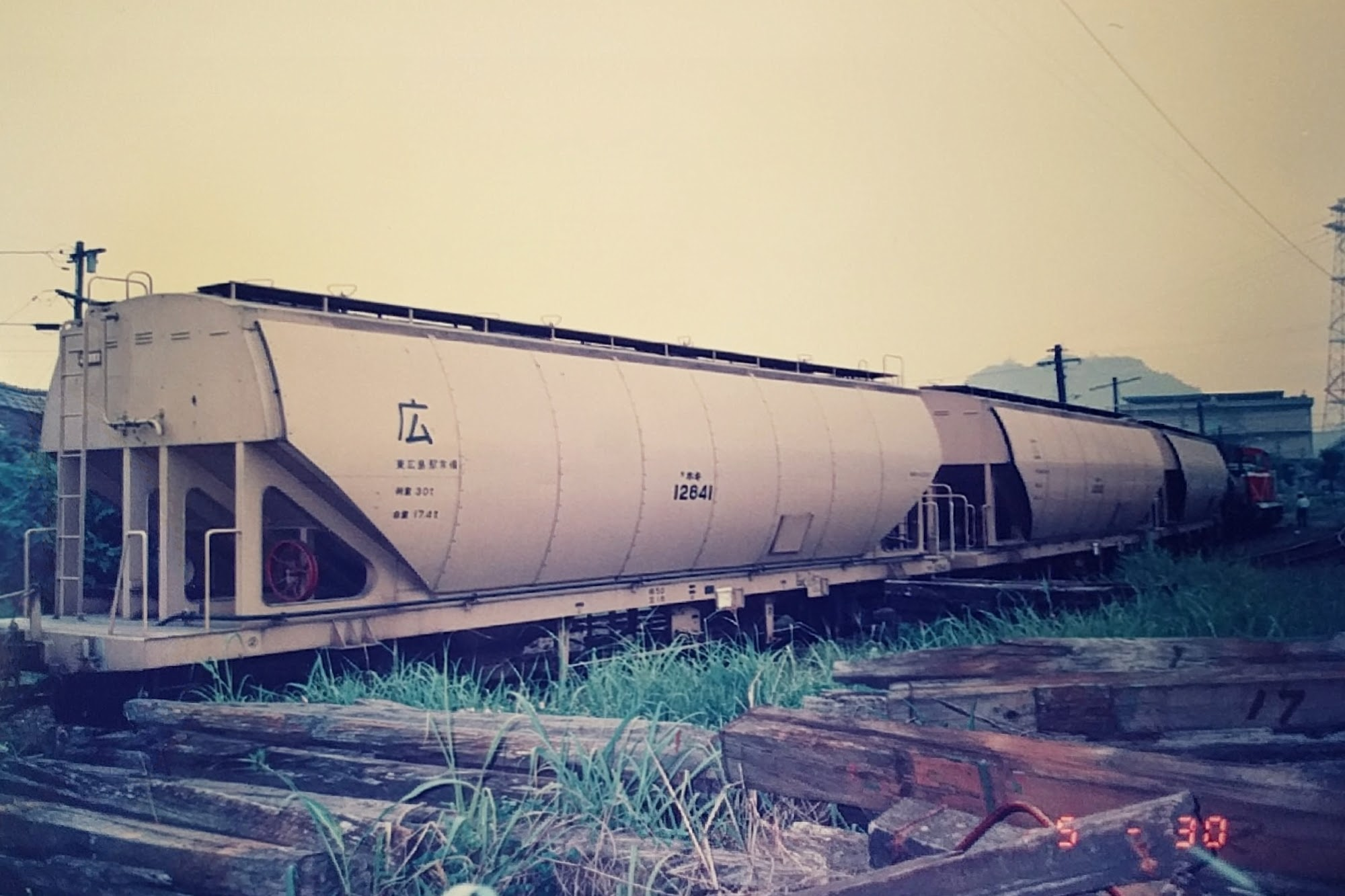 旧宇品駅で出発を待つ東広島駅行き上り貨物列車。1986年6月11日午前5時30分。